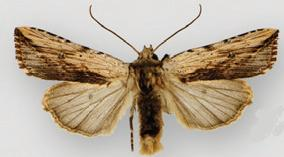 Hypotrix diplogramma male